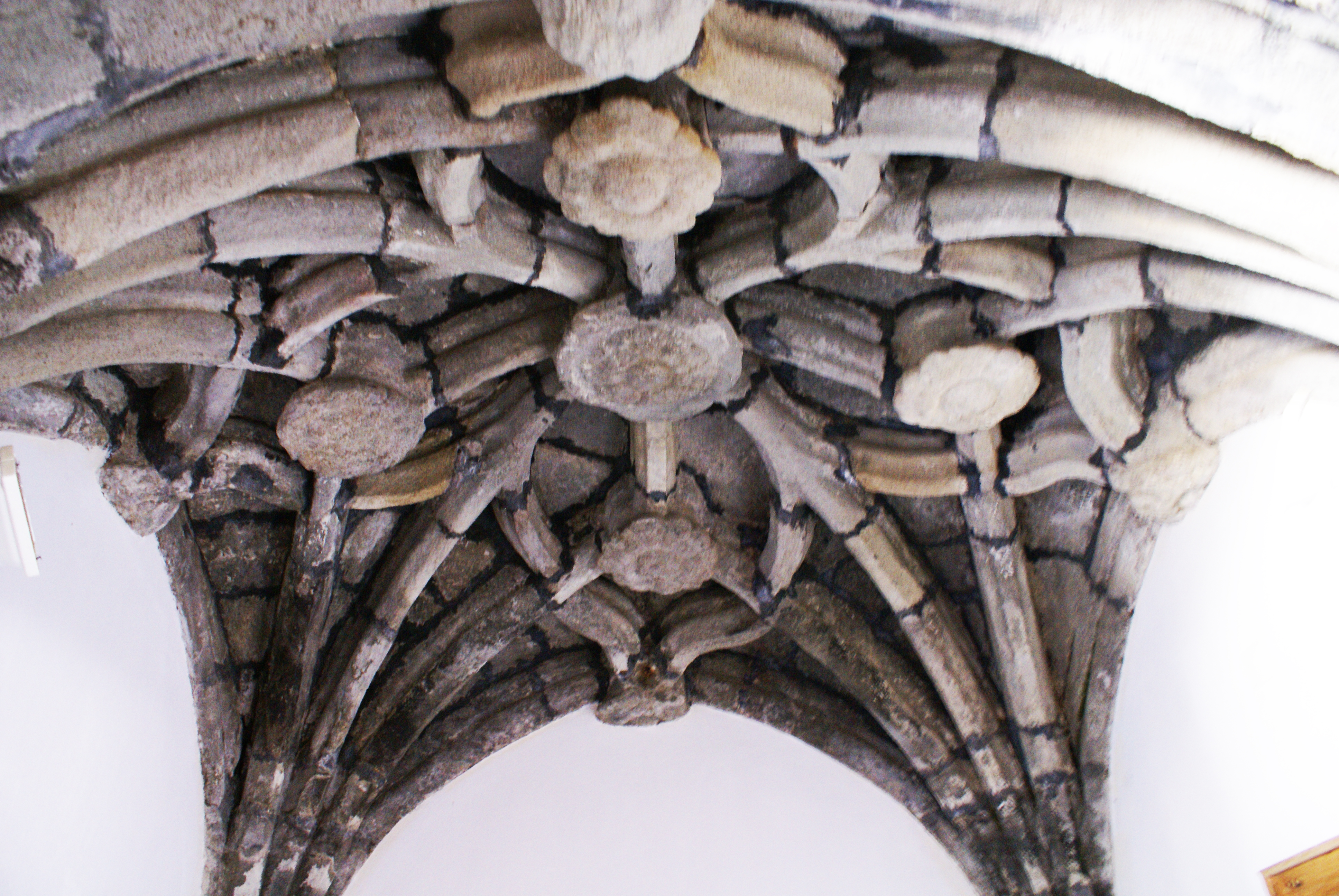 Igreja Matriz de Santa Cruz da Graciosa, pormenor do tecto, Santa Cruz da Graciosa, ilha Graciosa, Açores, Portugal